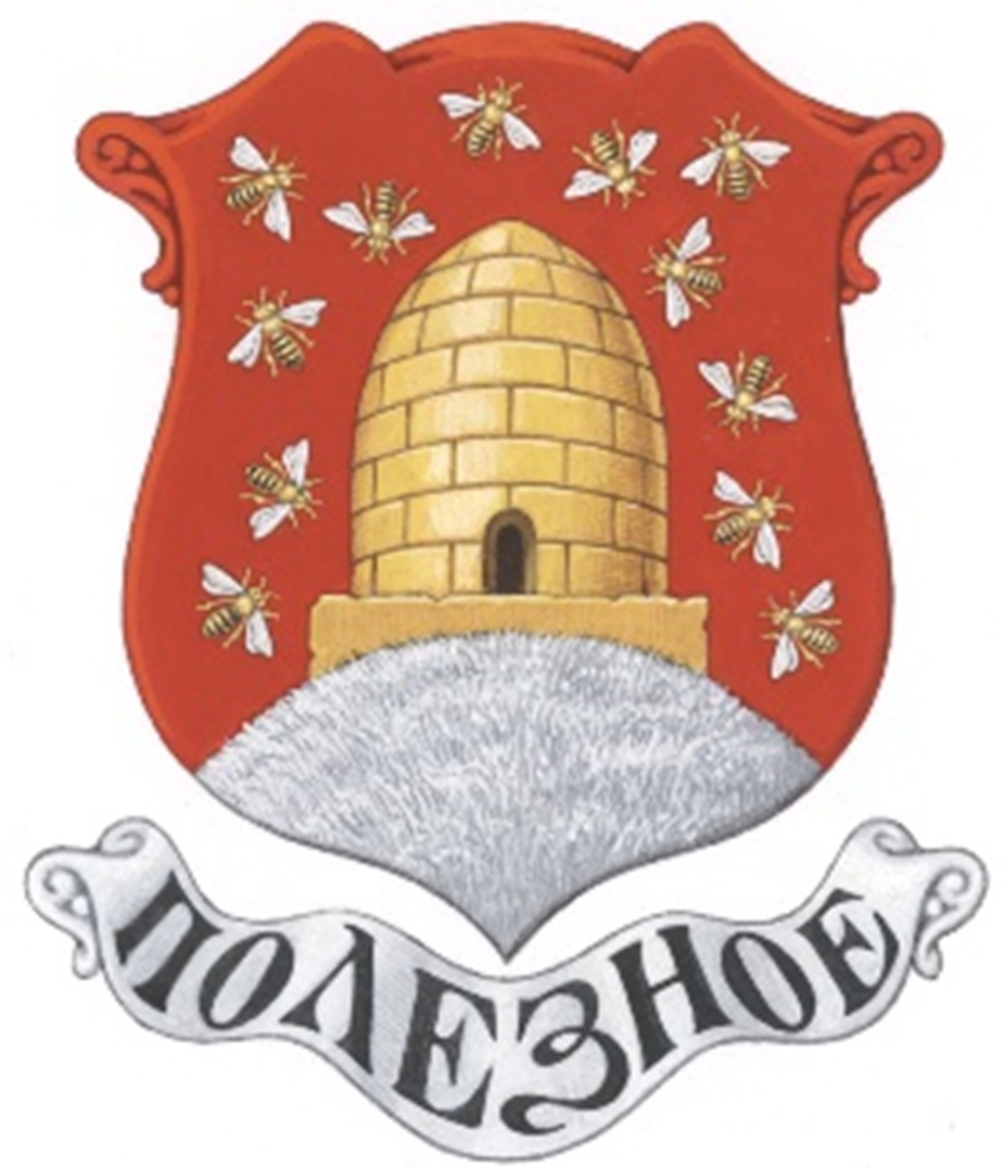 Герб ВЭО